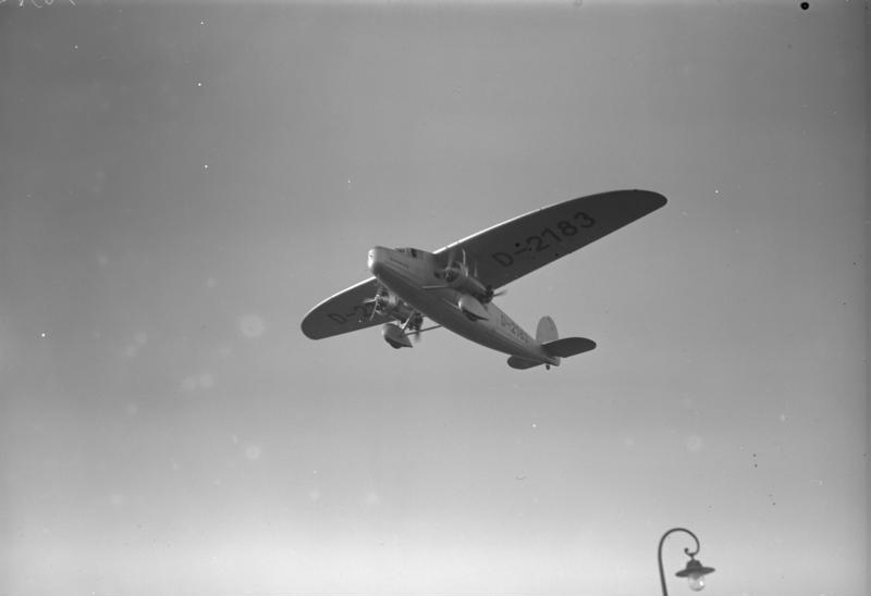 Ein neuer deutscher Luftriese ! Das neue deutsche Grossflugzeug "Do K" wurde zum ersten Mal den Behörden und Pressevertretern auf dem Flughafen Tempelhof in Berlin öffentlich vorgeführt. Das Flugzeug hat eine besondere Construktion, um den Luftwiderstand besser zu überwinden. Der Rumpf ist nach Zeppelinform gebaut und bietet in seinem Innern 10 Passagieren Platz. Die 4 Motoren haben eine Gesamtstärke von 960 P.S. geben dem Flugzeug eine Stundengeschwindigkeit vbis zu 250 km. Das neue deutsche Grossflugzeug "Do K" im Fluge.